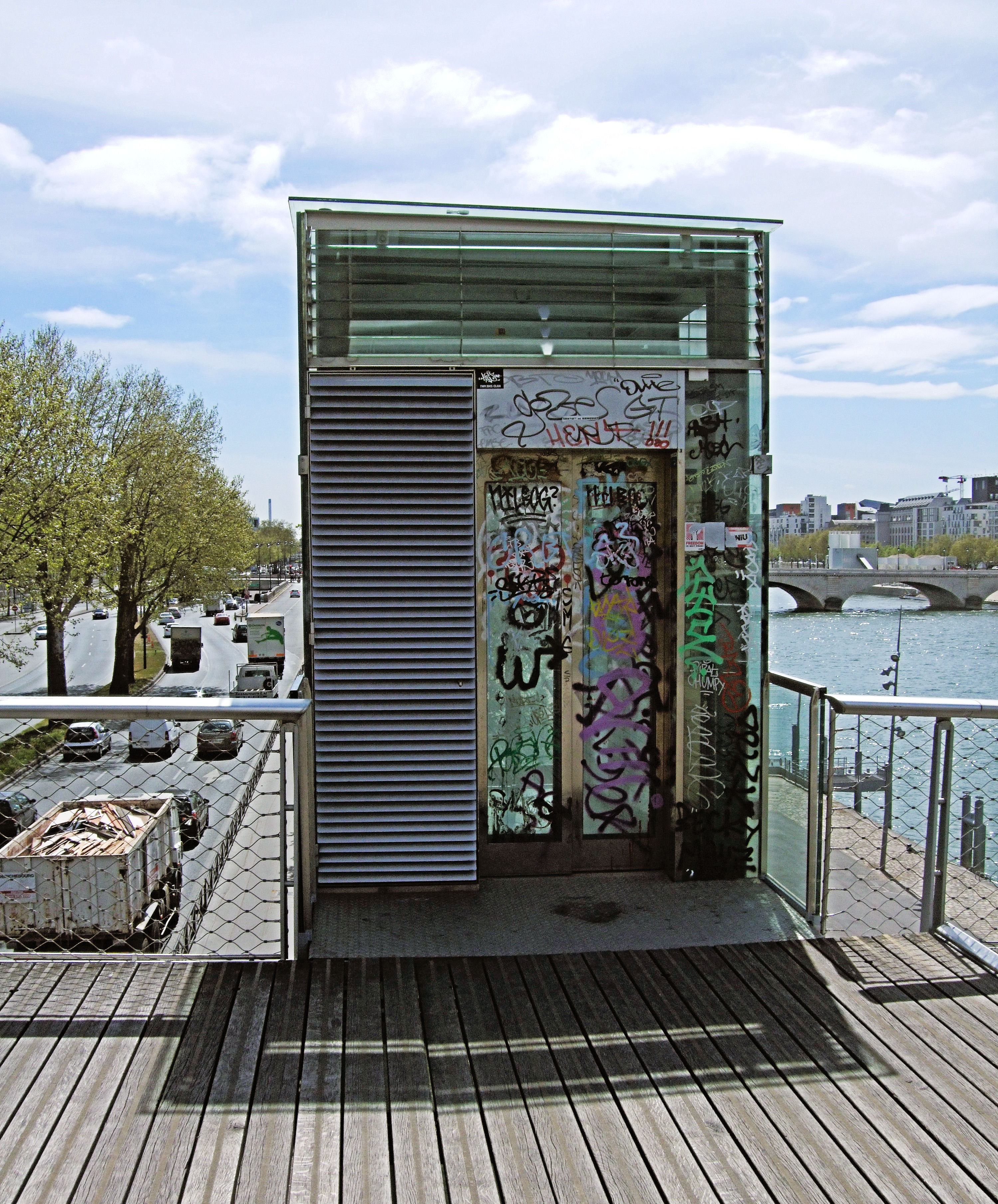 Graffiti On The Passerelle Simone-de-Beauvoir Over The Seine, Paris.